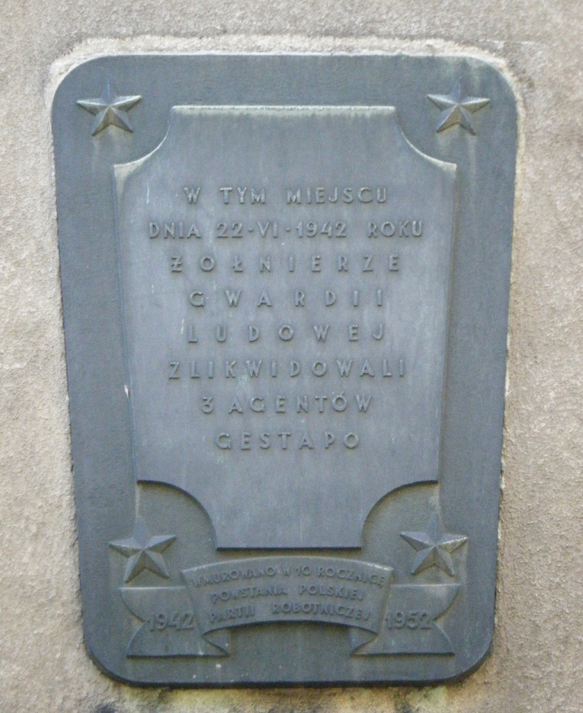 Tablica upamiętniająca publiczną egzekucję wykonaną przez żołnierzy GL w 1942 roku. Warszawa, Saska Kępa, ul. Saska 91.